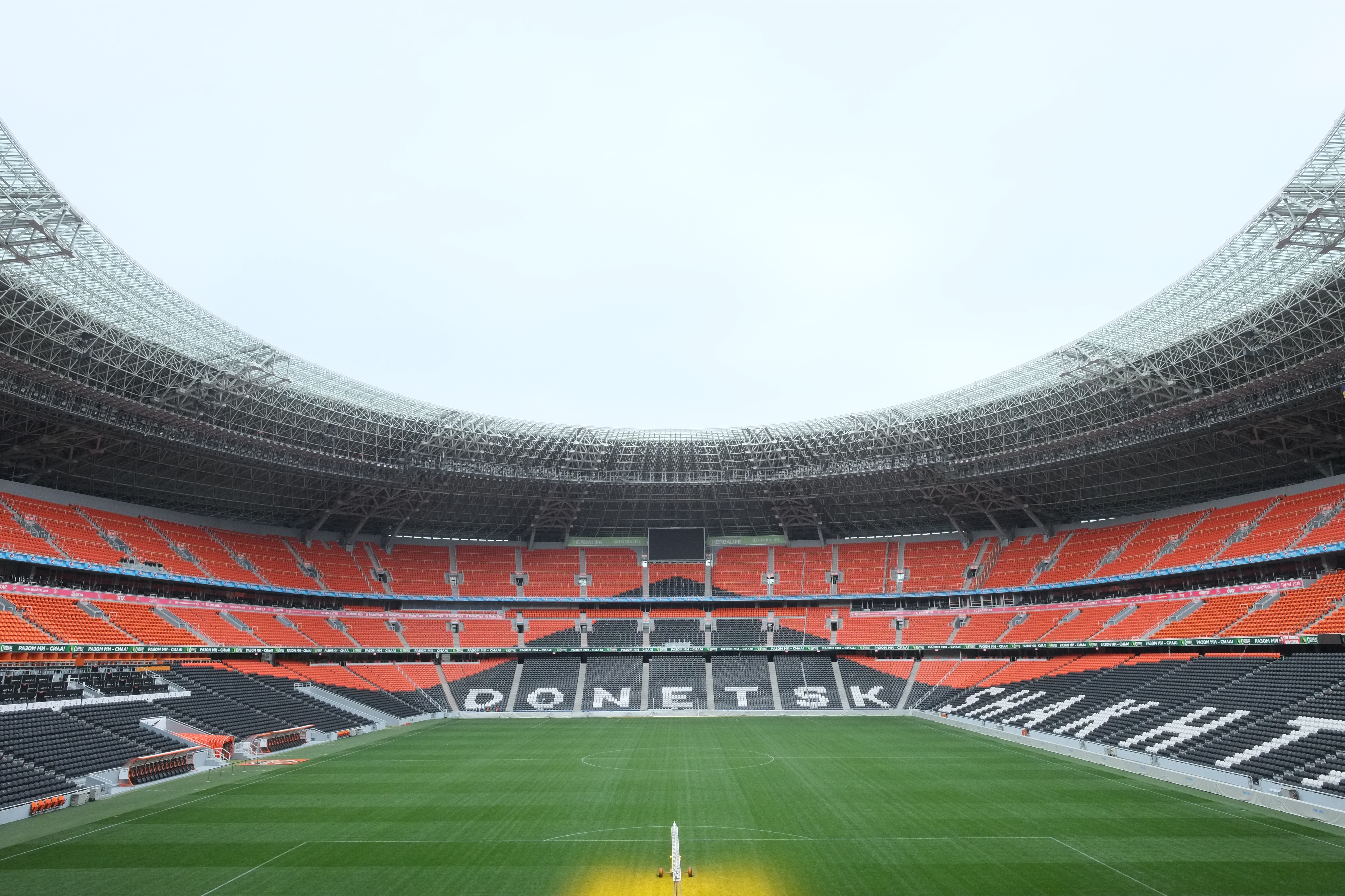 DrupalCamp Donetsk 2014